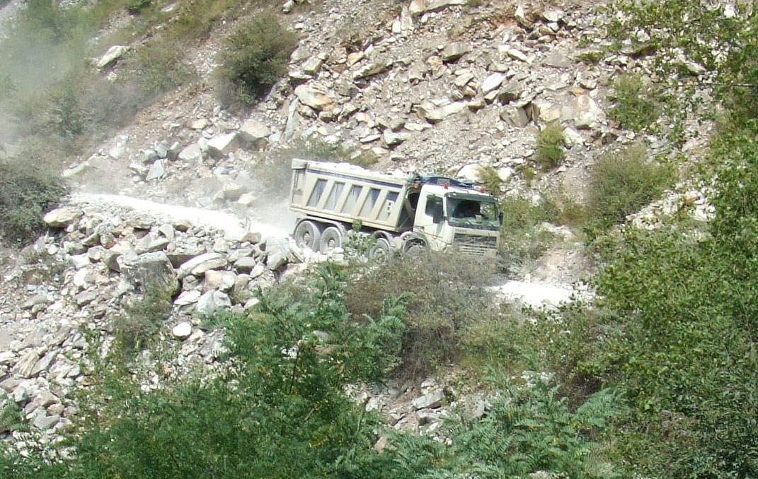 Camion des carrières dévalant les pentes des chantiers des carrières de marbre de Carrare